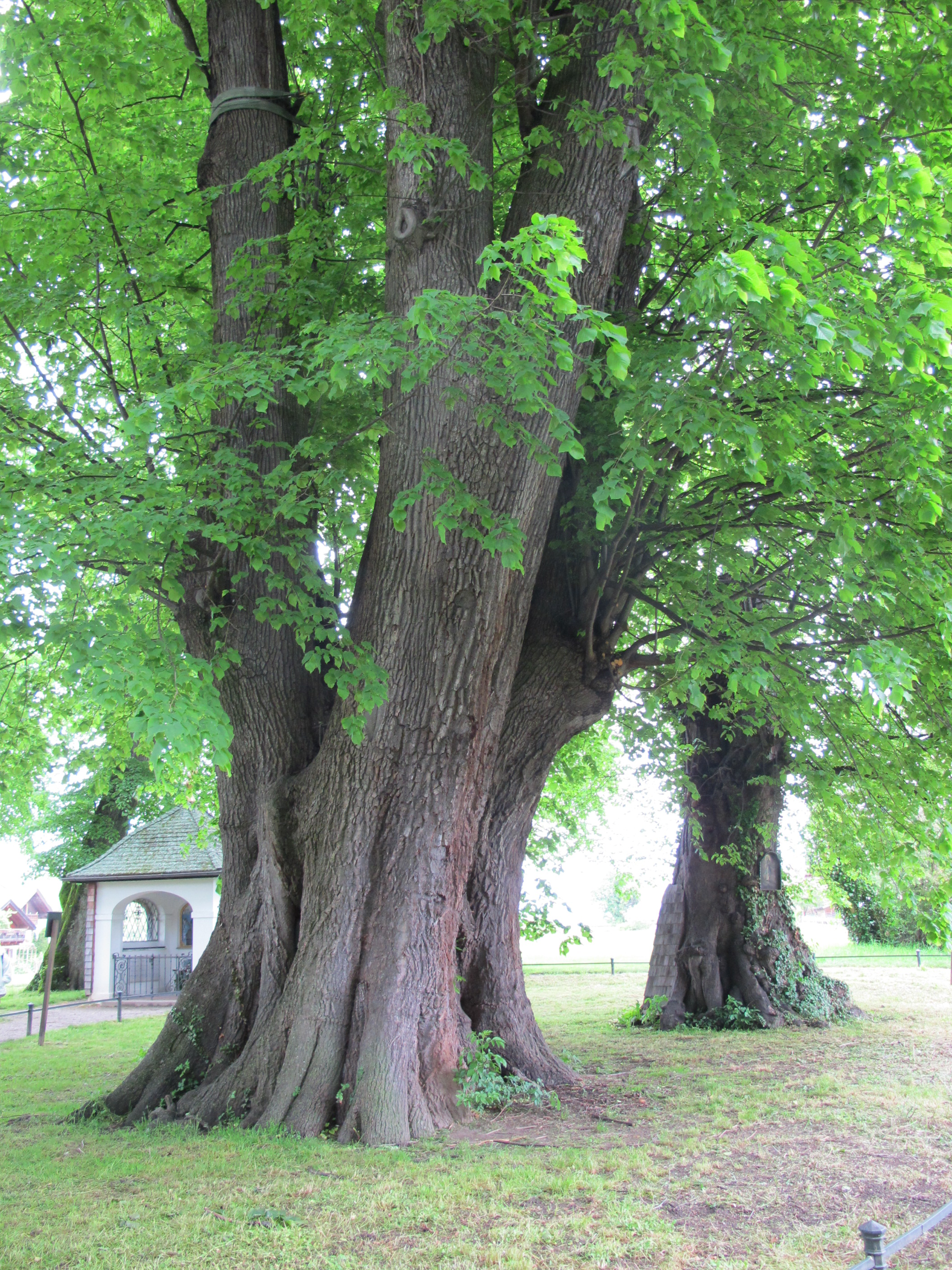 Tassilolinde und Marienlinde im Lindenhain Frauenchiemsee